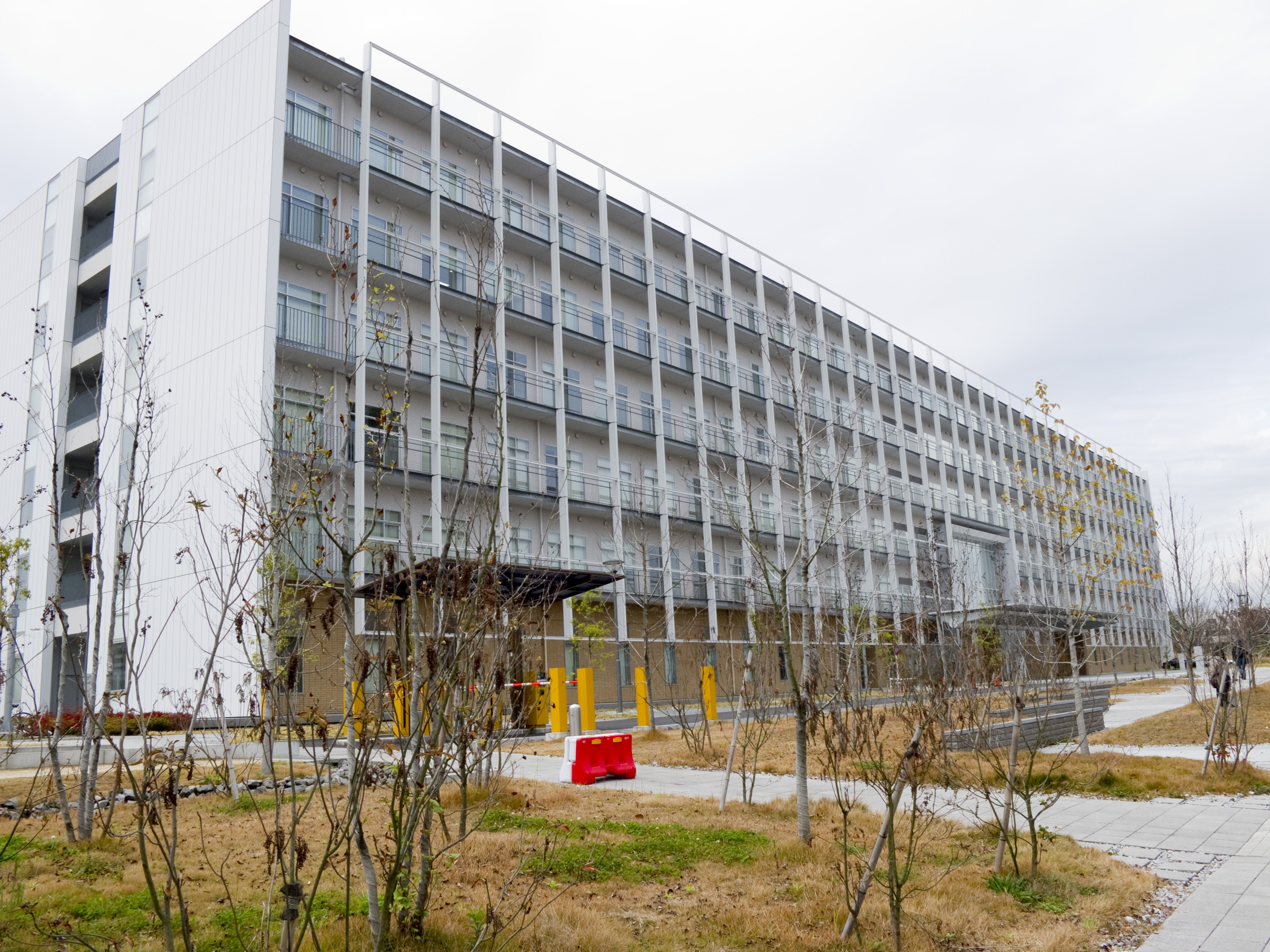 統計数理研究所などが移転した新しい建物。ホームページの画像はかっこいいが，実物は殺風景。付近には裁判所くらいしかない。